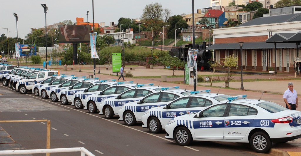 Patrulleros de la Policía de Misiones en la costanera de la ciudad de Posadas, en Argentina.